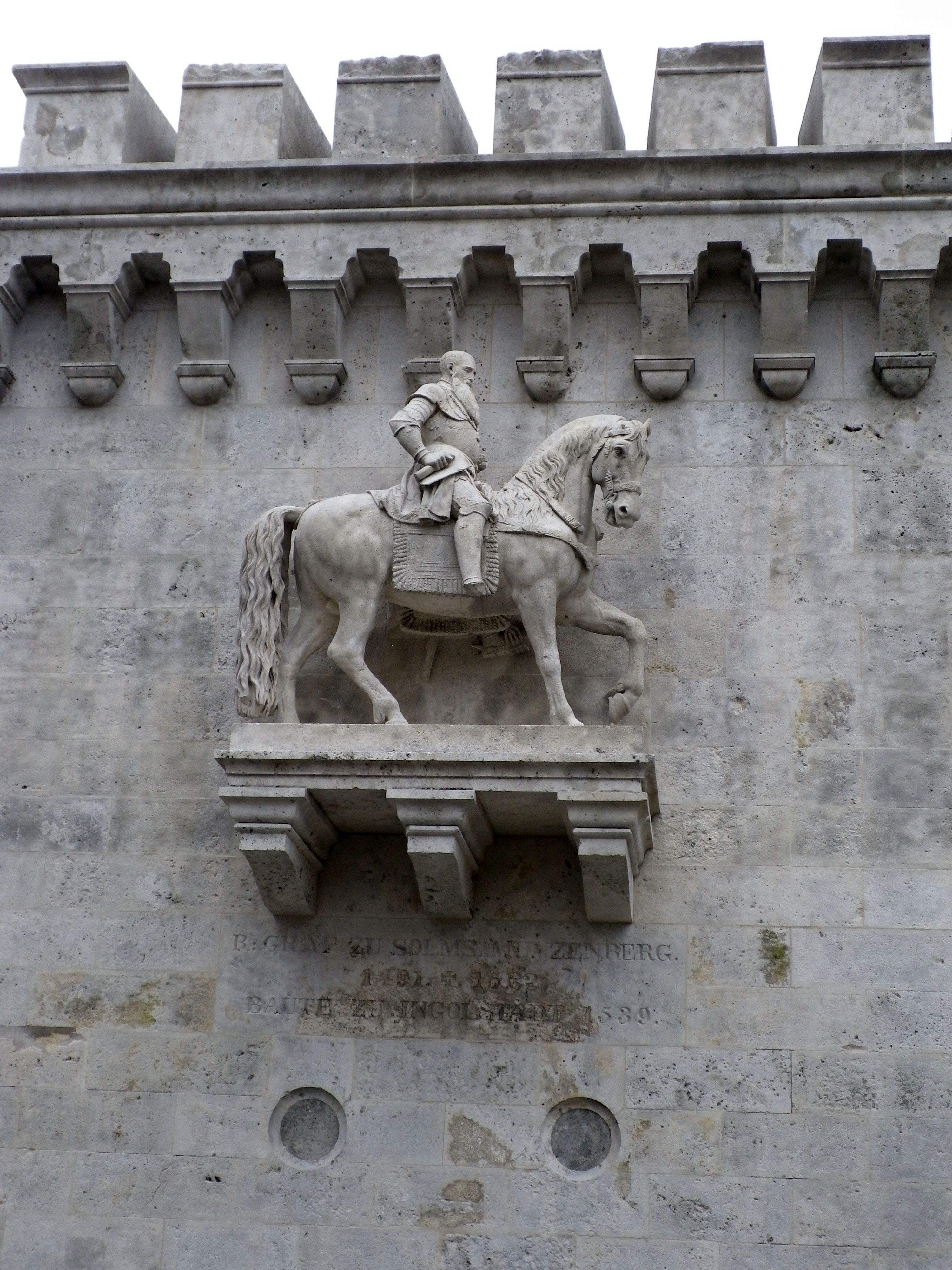 Reiterstatue von Graf Reinhard zu Solms am Kavalier Hepp in Ingolstadt. Inschrift: R. Graf zu Solms Münzenberg 1491 + 1562 Baute zu Ingolstadt 1539